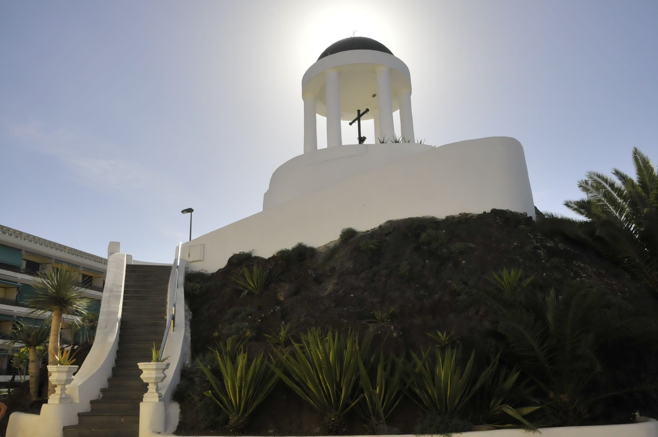 Puerto de la Cruz de Tenerife, Peñón del Fraile